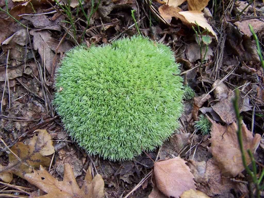 Leucobryum glaucum (pl. bielistka siwa)